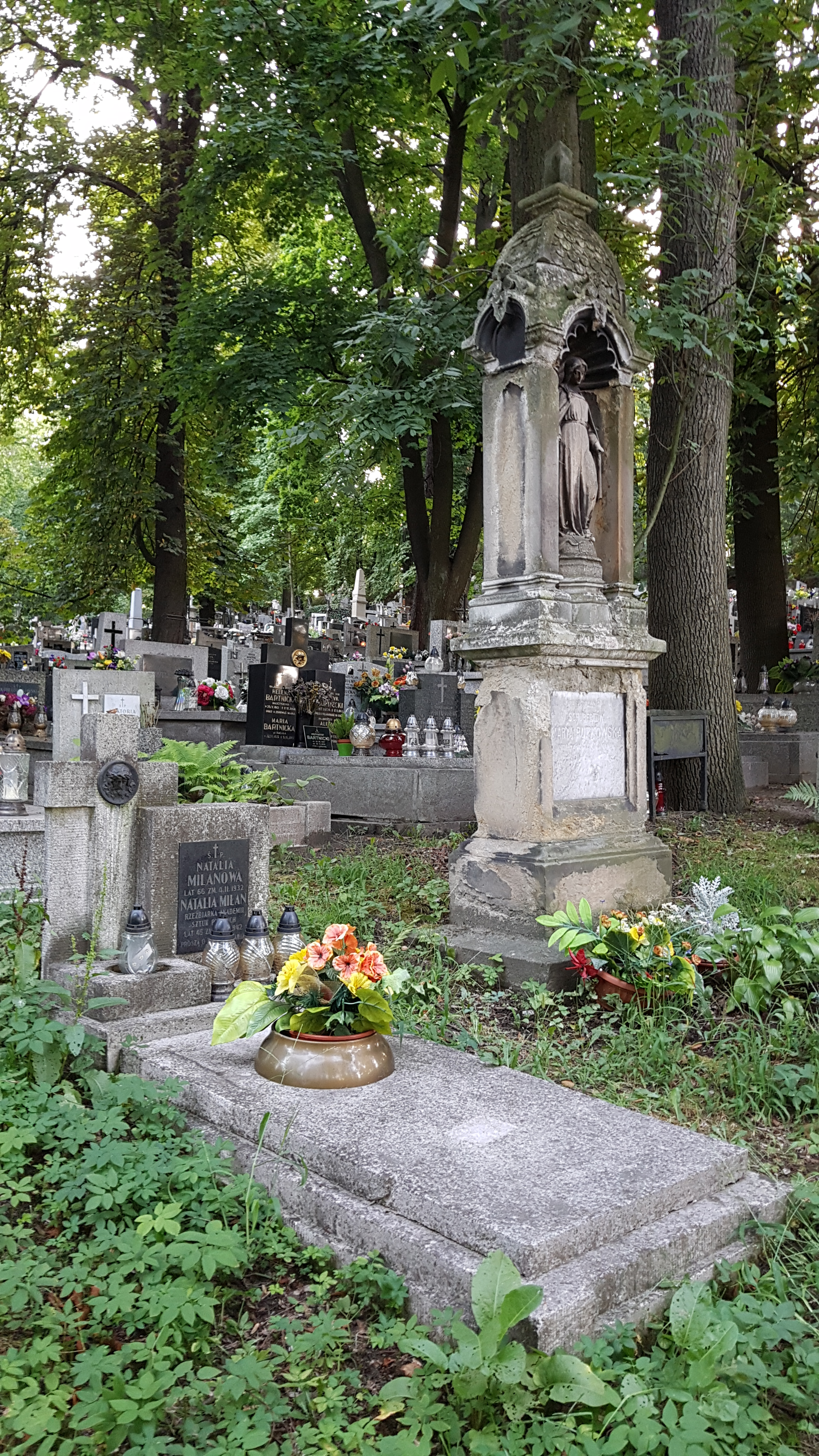 Grób rzeźbiarki Natalii Milan, jednej z pierwszych studentek na Akademii Sztuk Pięknych w Krakowie na Cmentarzu Podgórskim w Krakowie.